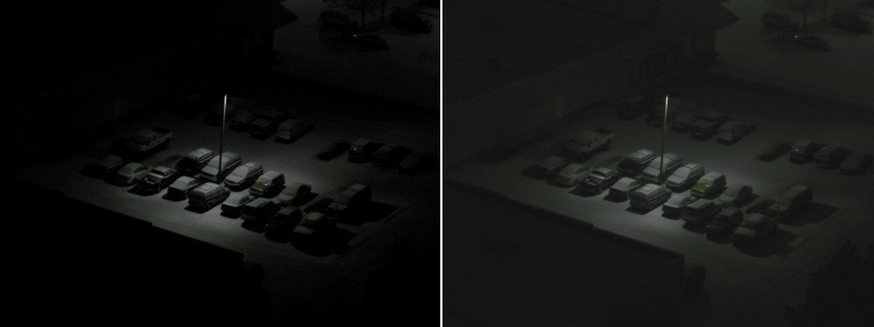 Simulation de Post-lumination